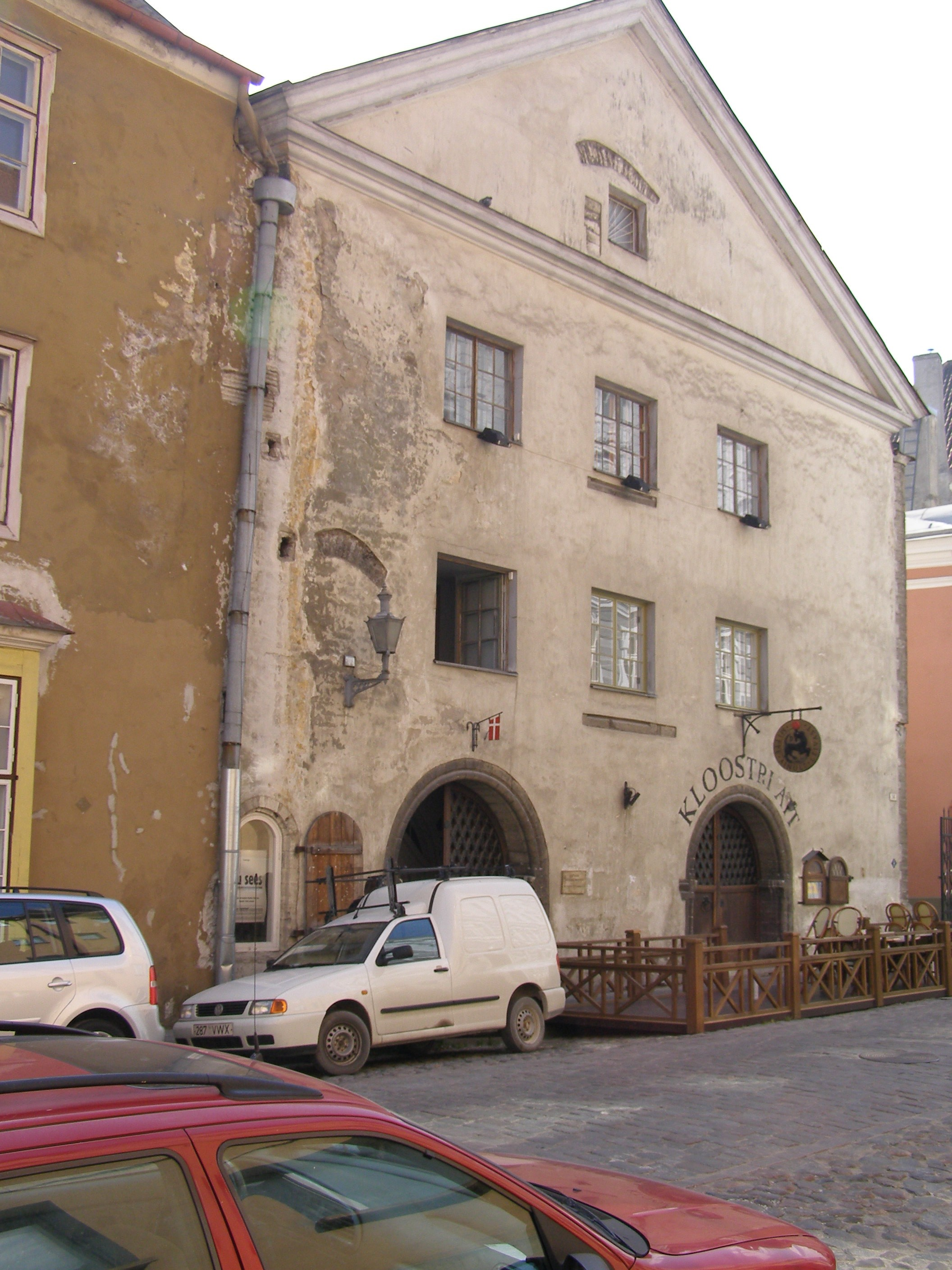 Tallinna vanalinn (Tallinn Old Town / Tallinn Altstadt / Tallin, staré město) Kloostri ait A restaurant in the Old monastery area / Restaurant im Komplex des Dominikanerklosters / Restaurace v komplexu budov dominikánského kláštera